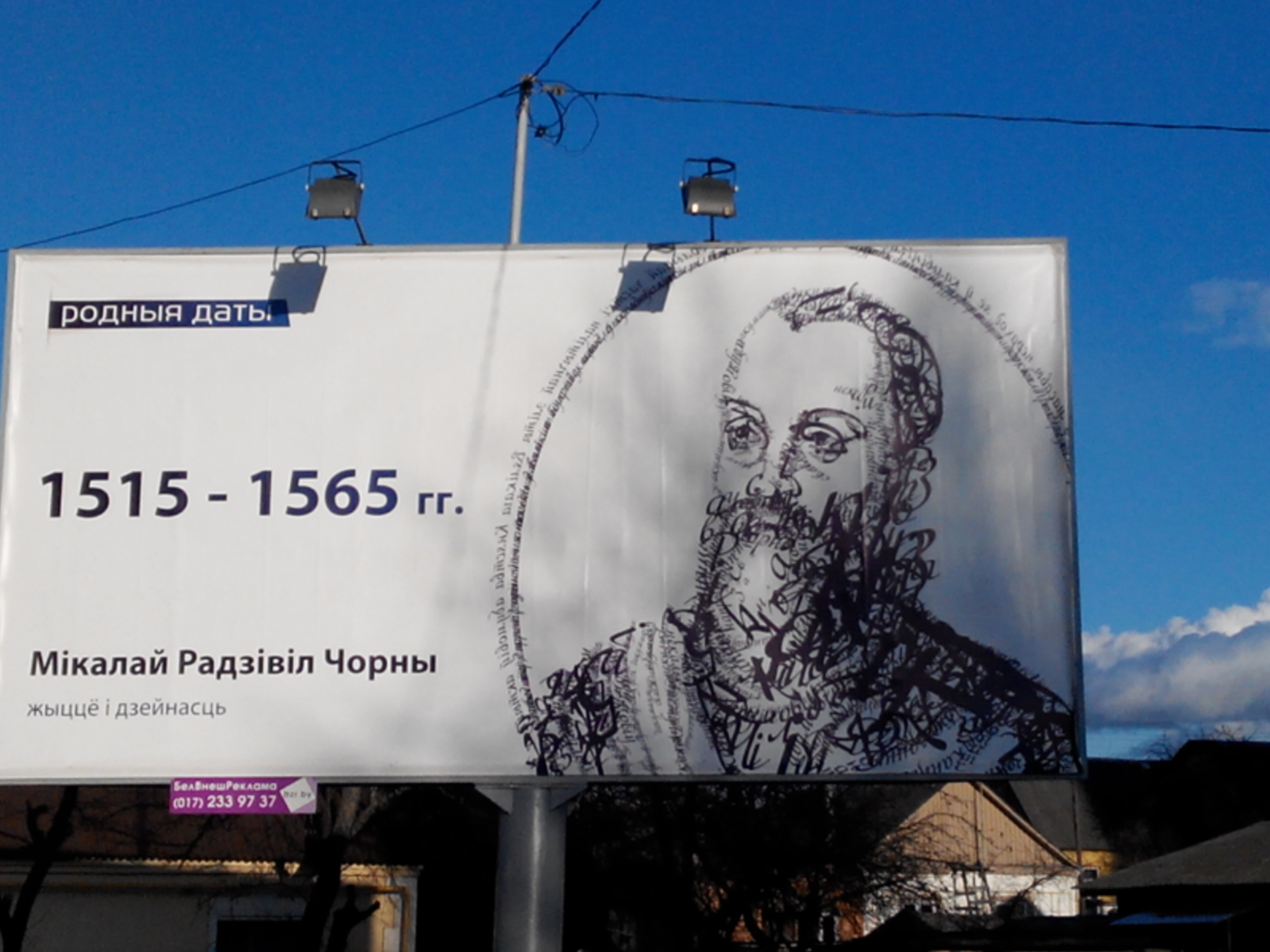 Фота сацяльнай рэкламы, прысвечанай 500-годдзя нараджэння і 450-годдзя смерці Мікалай Радзівіла Чорнага. Мінск, вул. Сталетава.